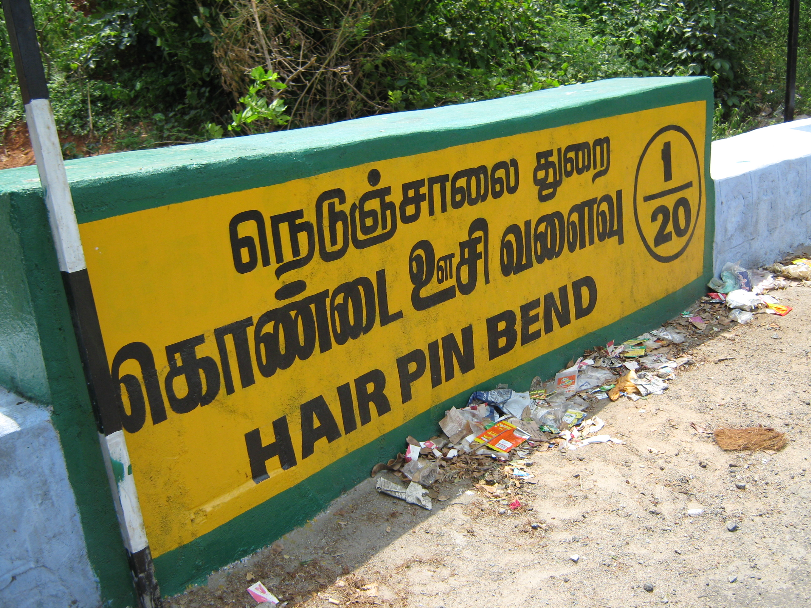 கொண்டை ஊசி வளைவு அறிவிப்புப் பலகை